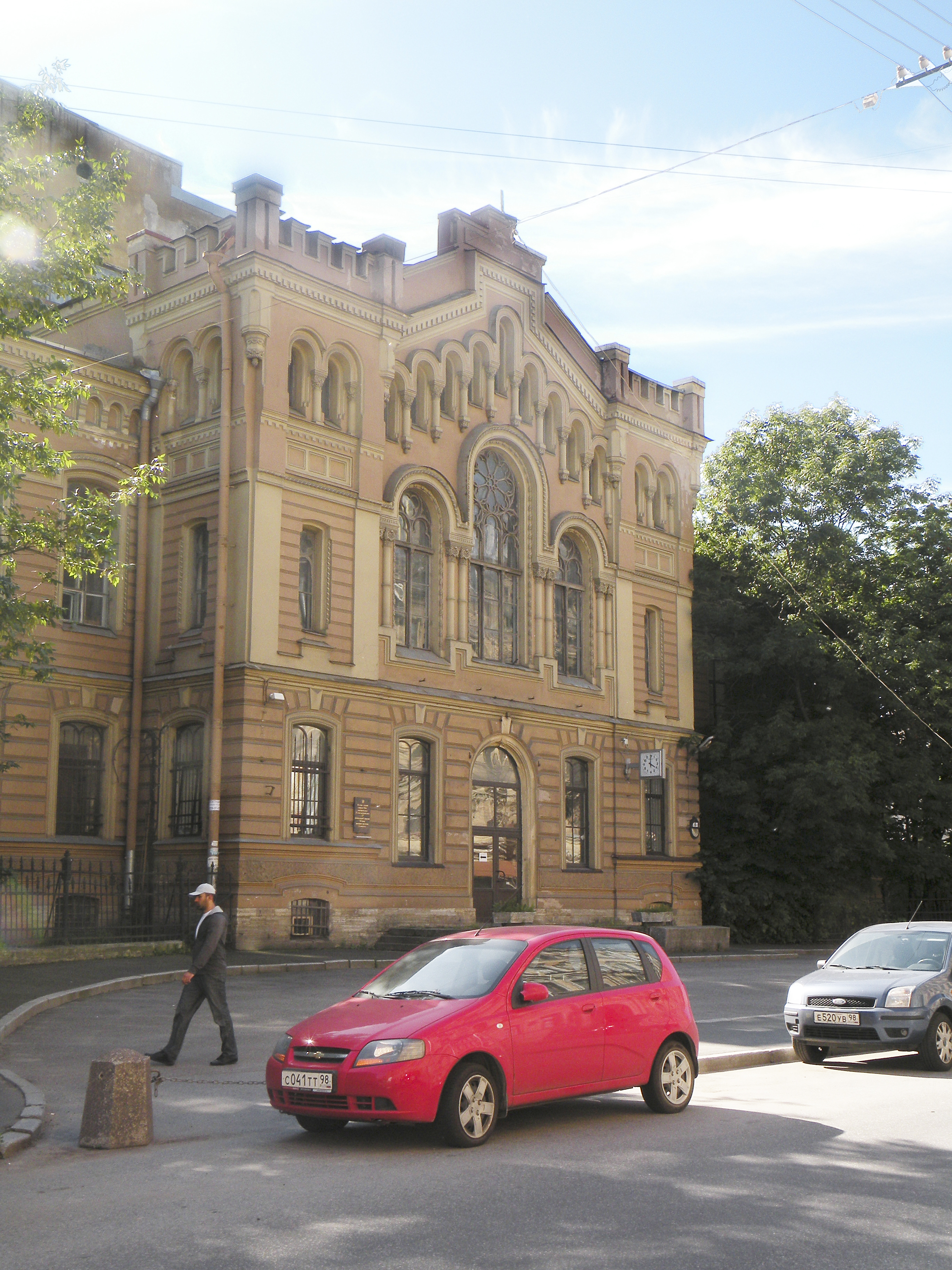 Здание Императорского коммерческого училища с церковью Апостолов Петра и Павла